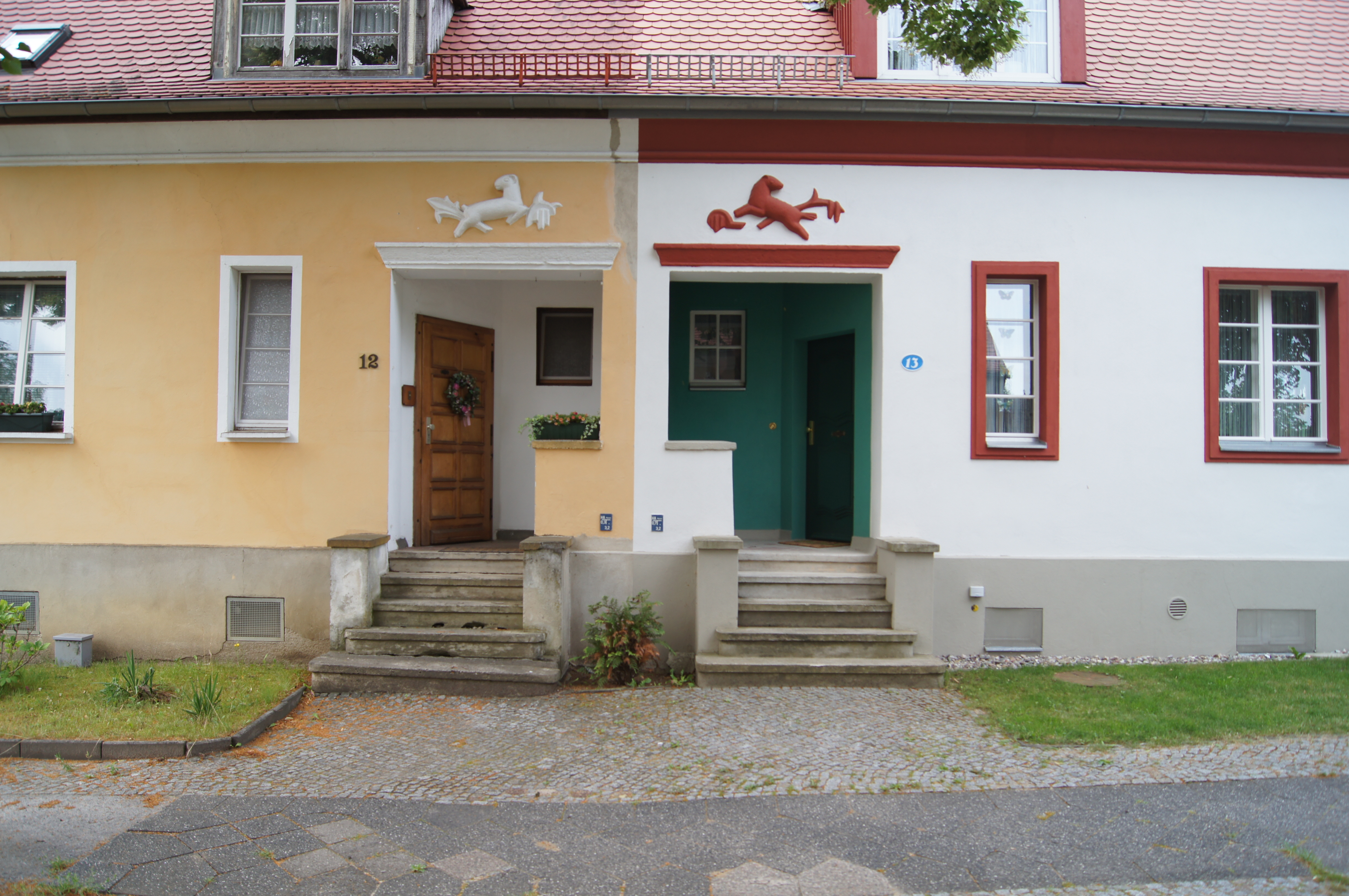 Wohnsiedlung Paulinenhof, Frankfurt (Oder)